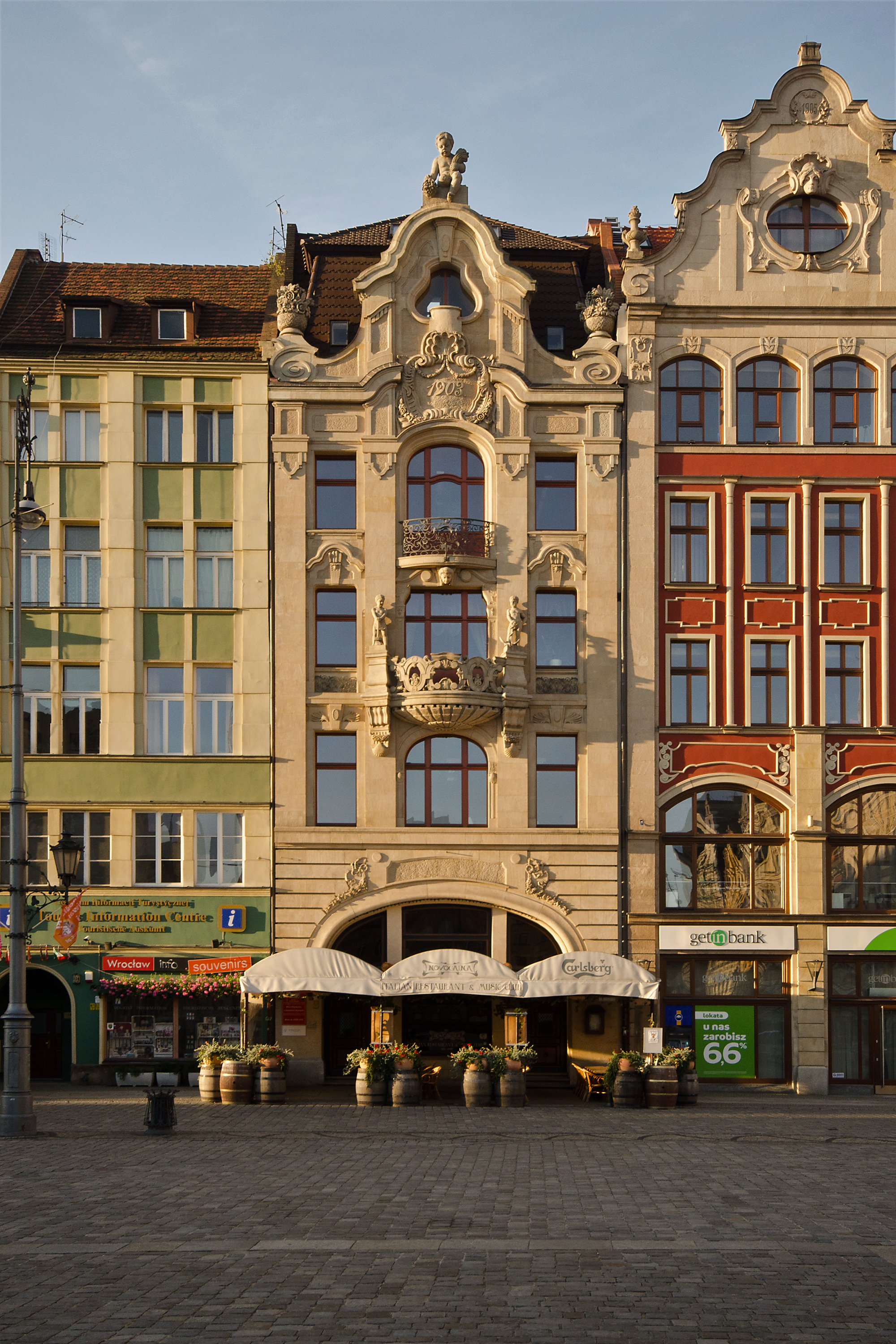 Kamienica Rynek 13, Miasto Wrocław - Stare Miasto